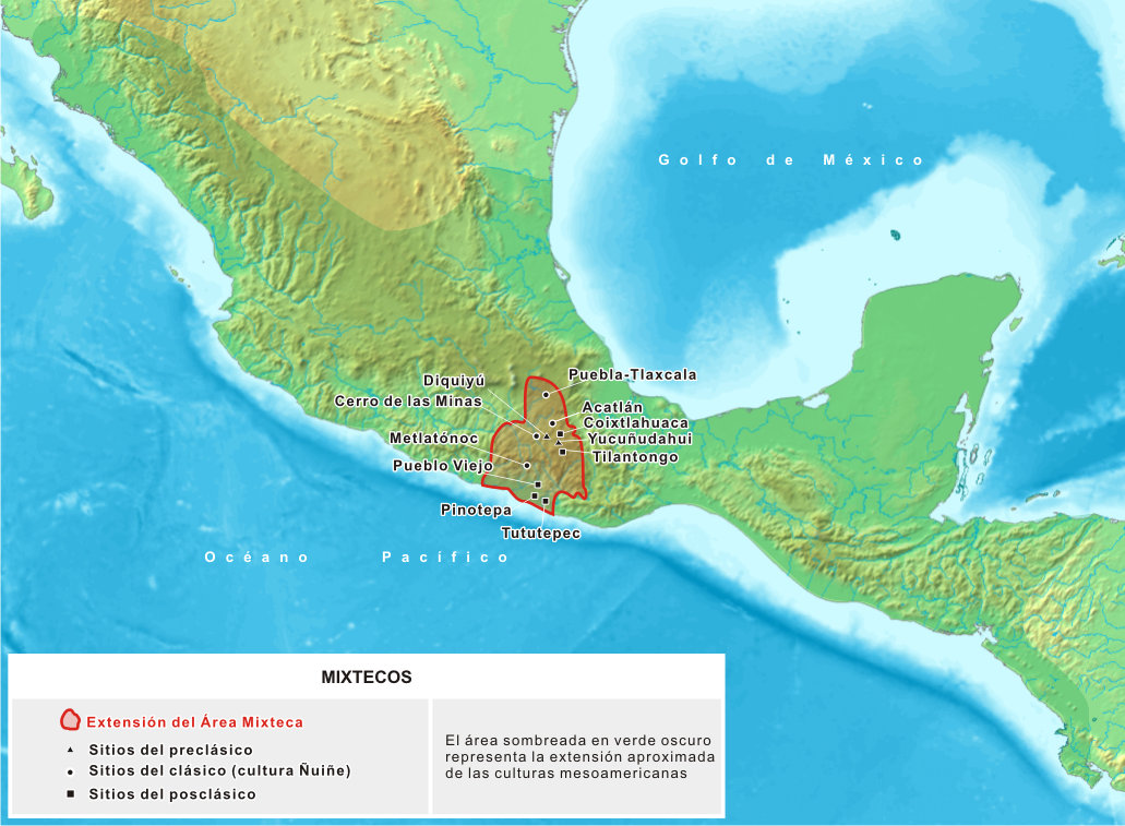 Mapa donde se detallan los sitios asociados a la cultura mixteca, que se desarolló en Mesoamérica entre los siglos XV adC y XVI dC